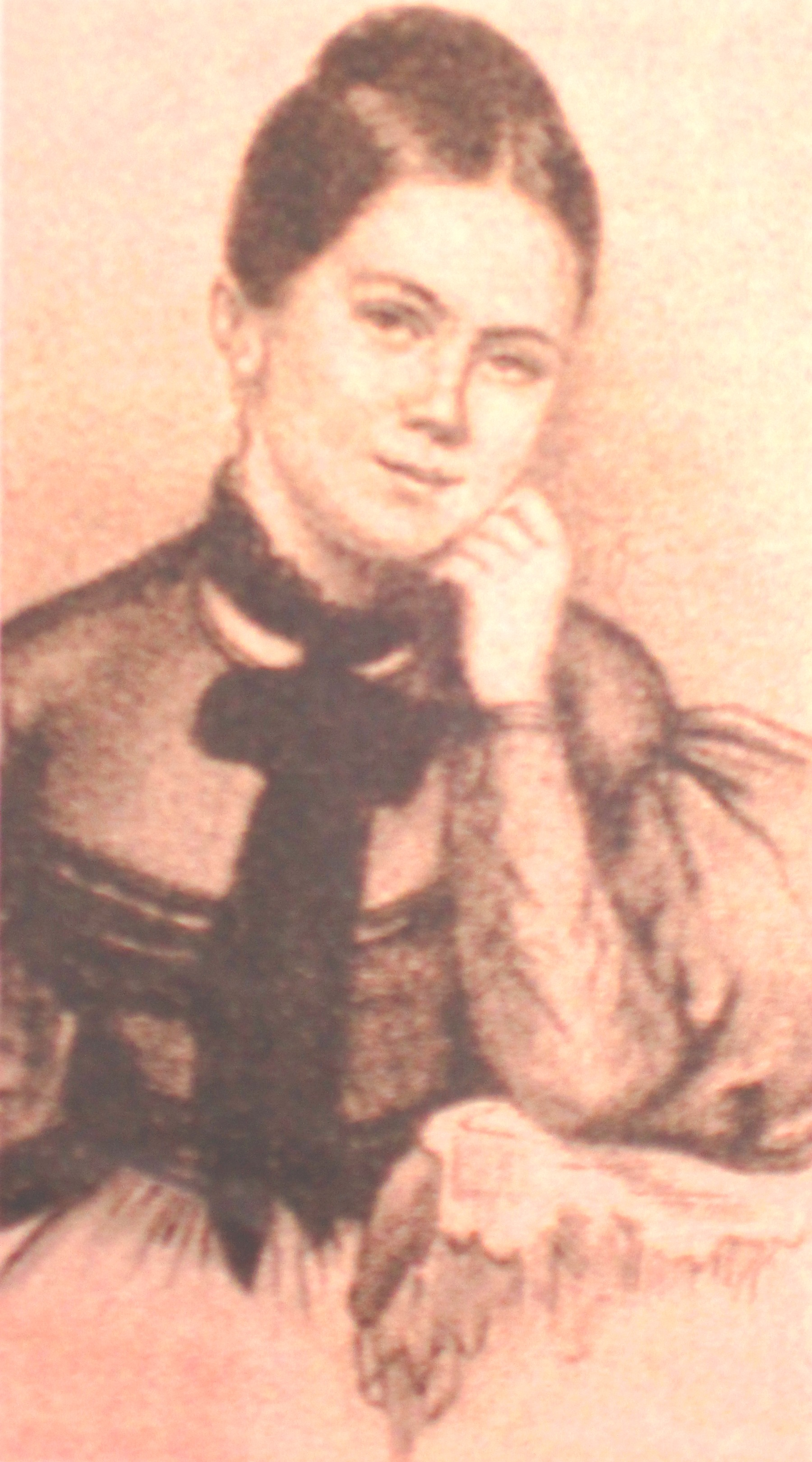 Wilhelmine Jaeglé (1810–1880), Verlobte von Georg Büchner (1813–1837)